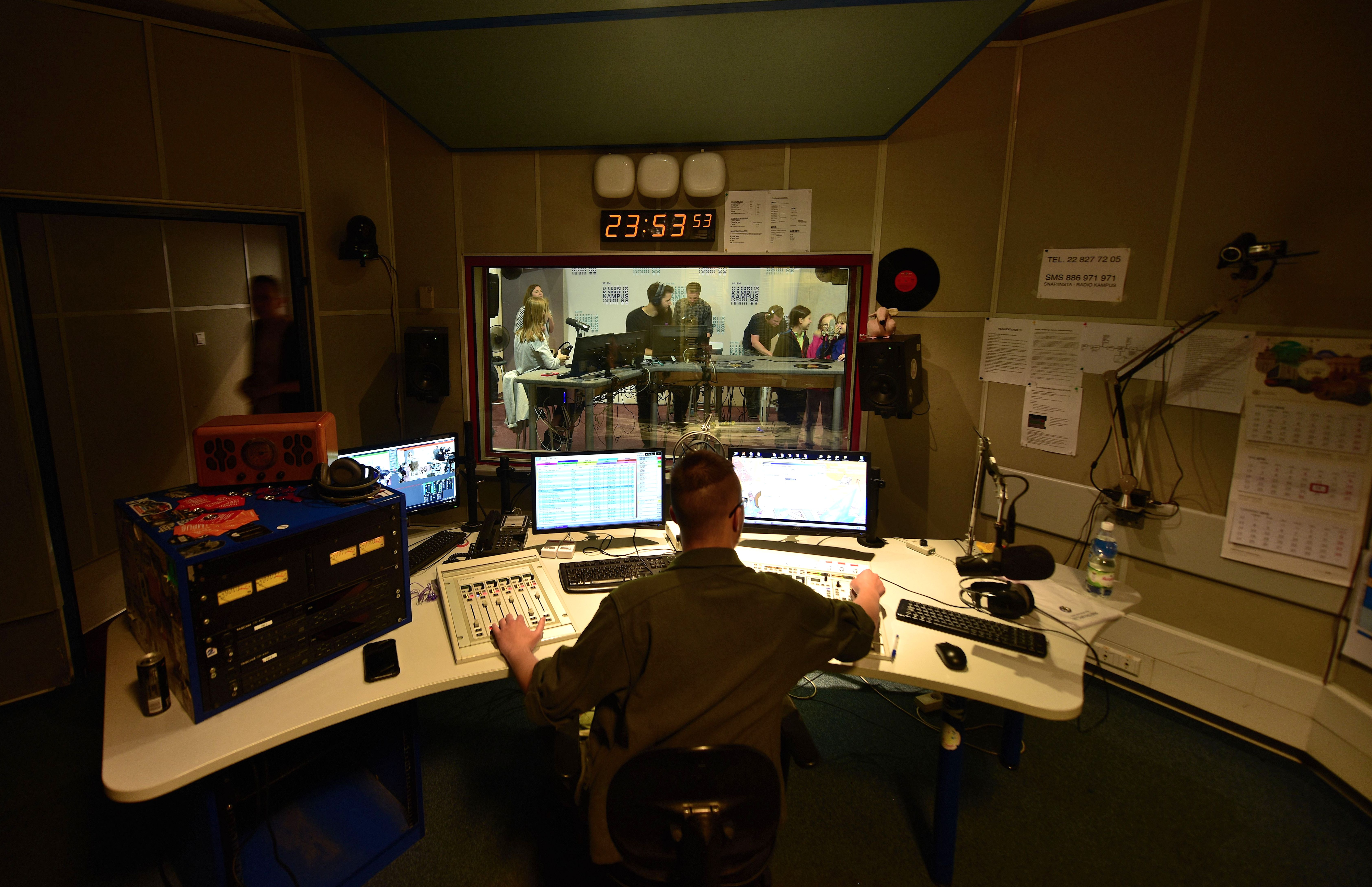 Akademickie Radio Kampus w Warszawie. Pokój realizatora dźwięku ("realizatorka")